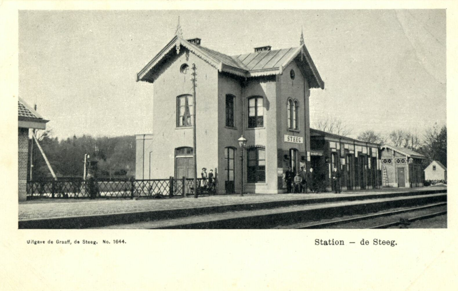 Gezicht op de perronzijde van het S.S.-station Steeg te De Steeg. N.B. De stationsnaam (De) Steeg is in 1927 gewijzigd in De Steeg-Rheden.